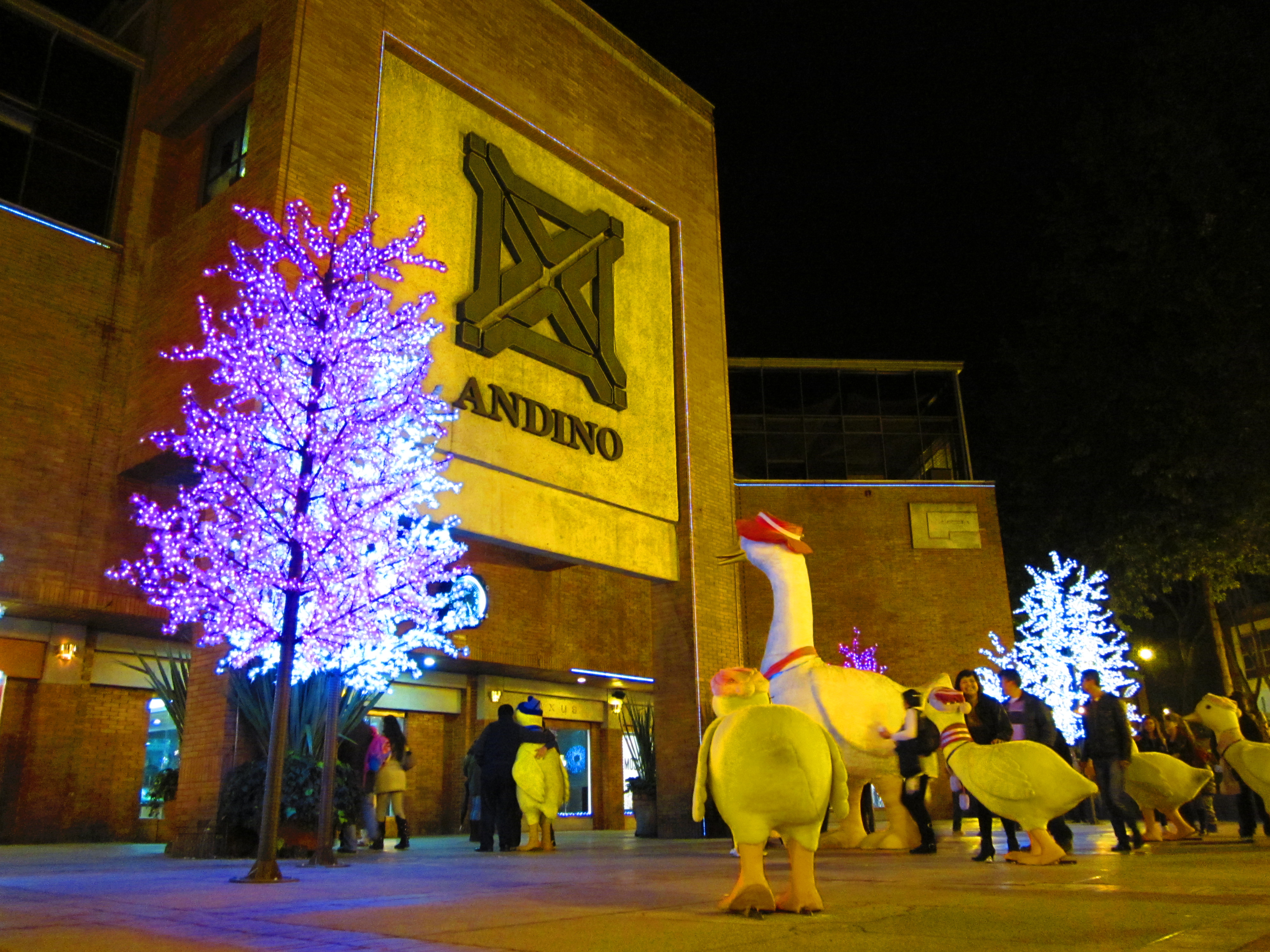 Decoración navideña en el centro comercial Andino de Bogotá.